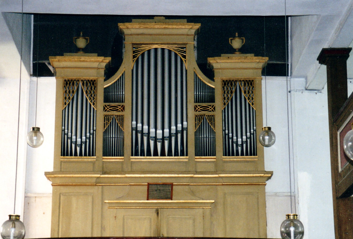 Gesicht der Orgel, Farbfassung im Jahr 2006